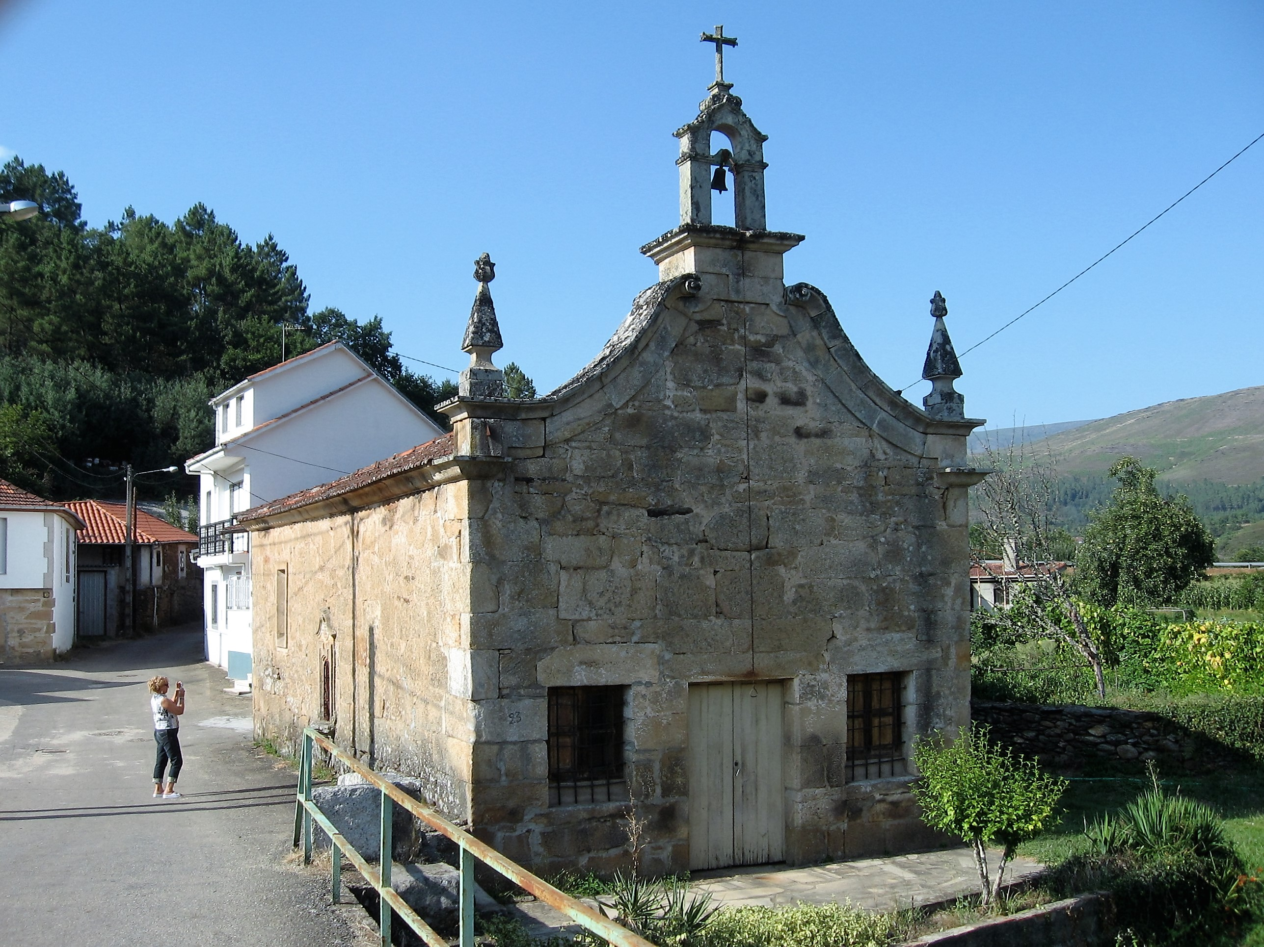 Soutelo Verde - Capilla del San Martiño